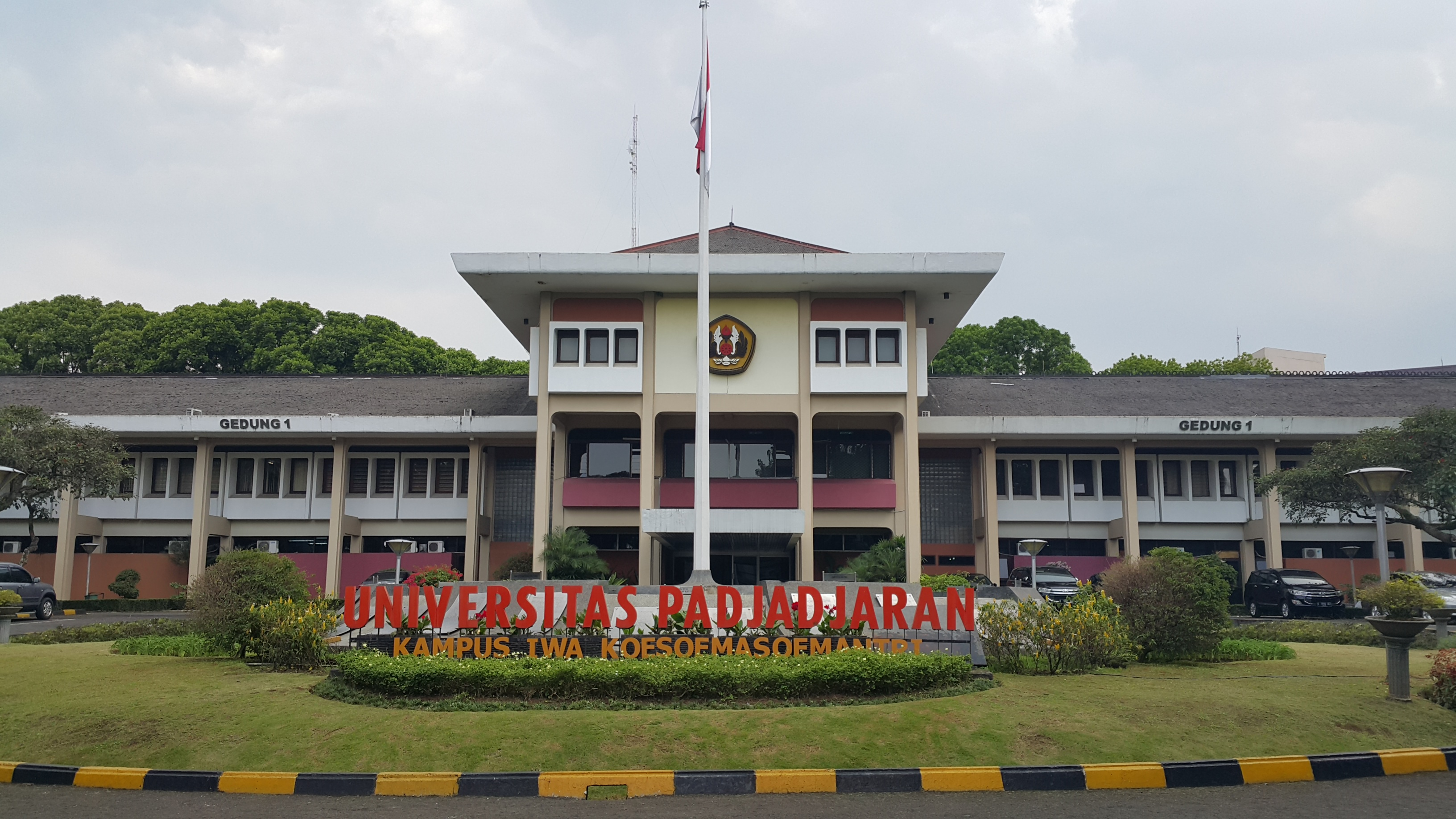 Kampus Unpad Dipati Ukur